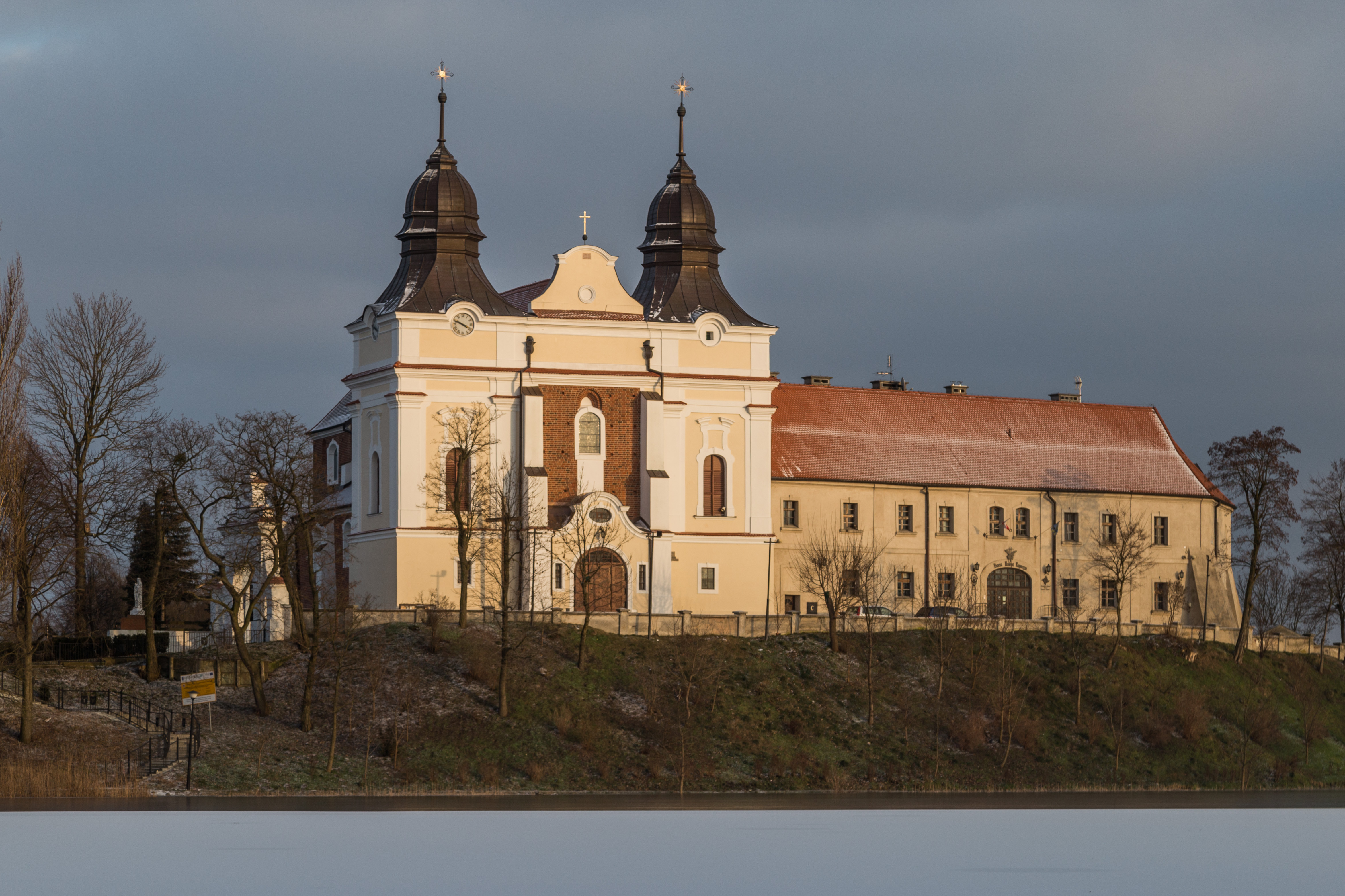 Dawny zespół klasztorny benedyktynów w Mogilnie, widok od strony zachodniej, z przeciwległego brzegu Jeziora Mogileńskiego.